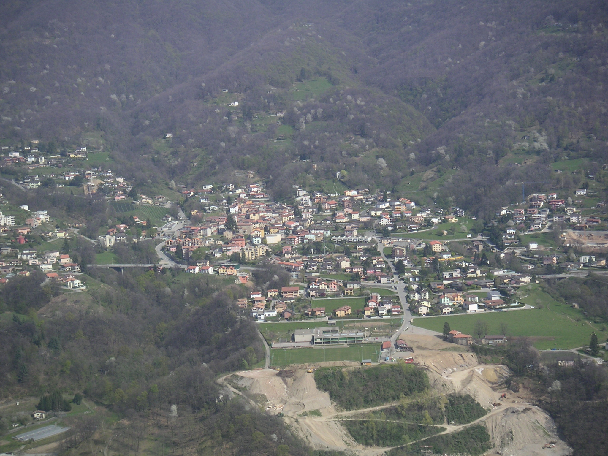 Cadro - veduta dal San Bernardo. Autore Fernando Pescia paco (scrivimi) 19:32, 9 apr 2007 (CEST)